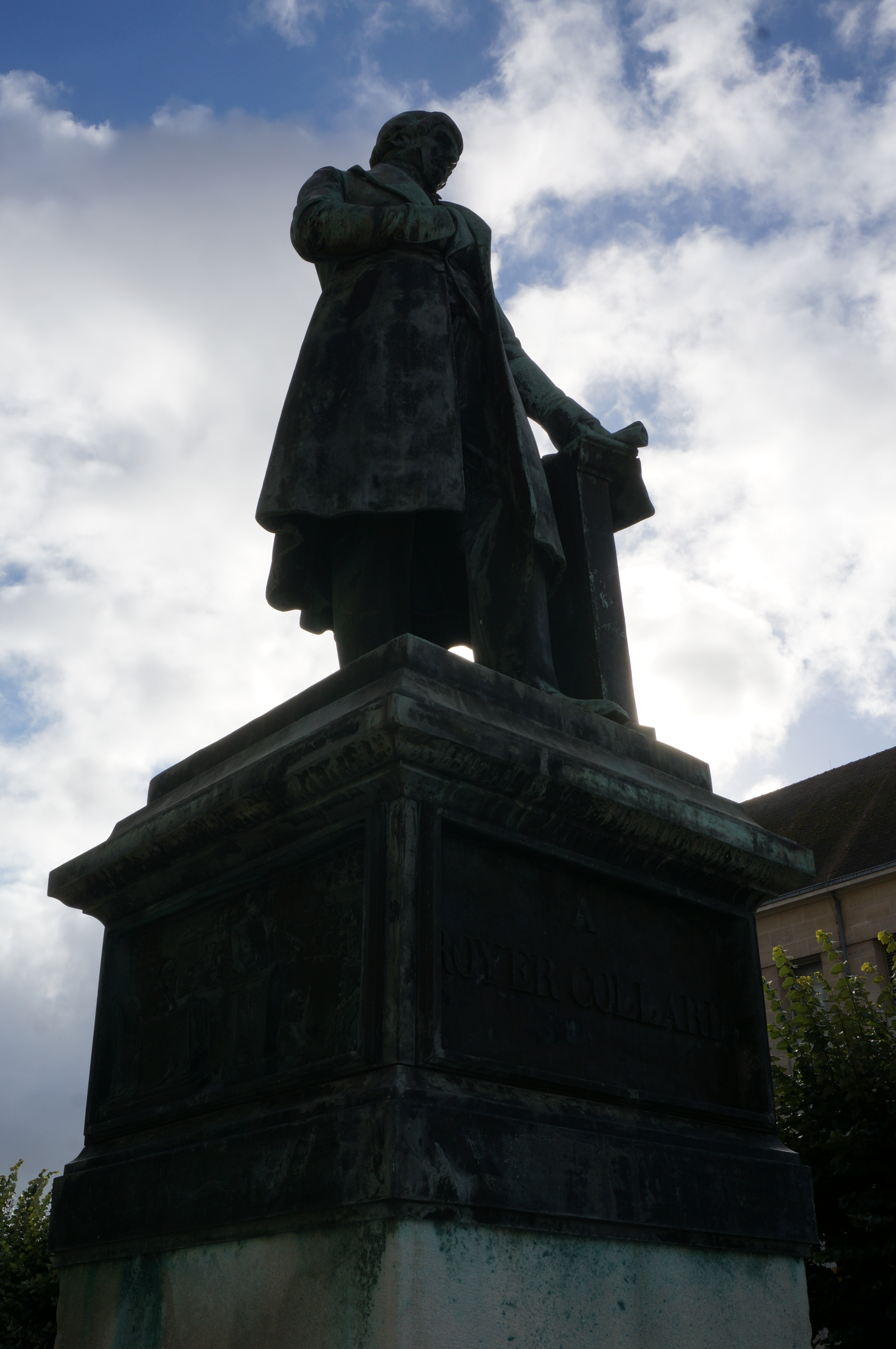 la statue de Royer-Collard sur la place éponyme de Vitry le François.